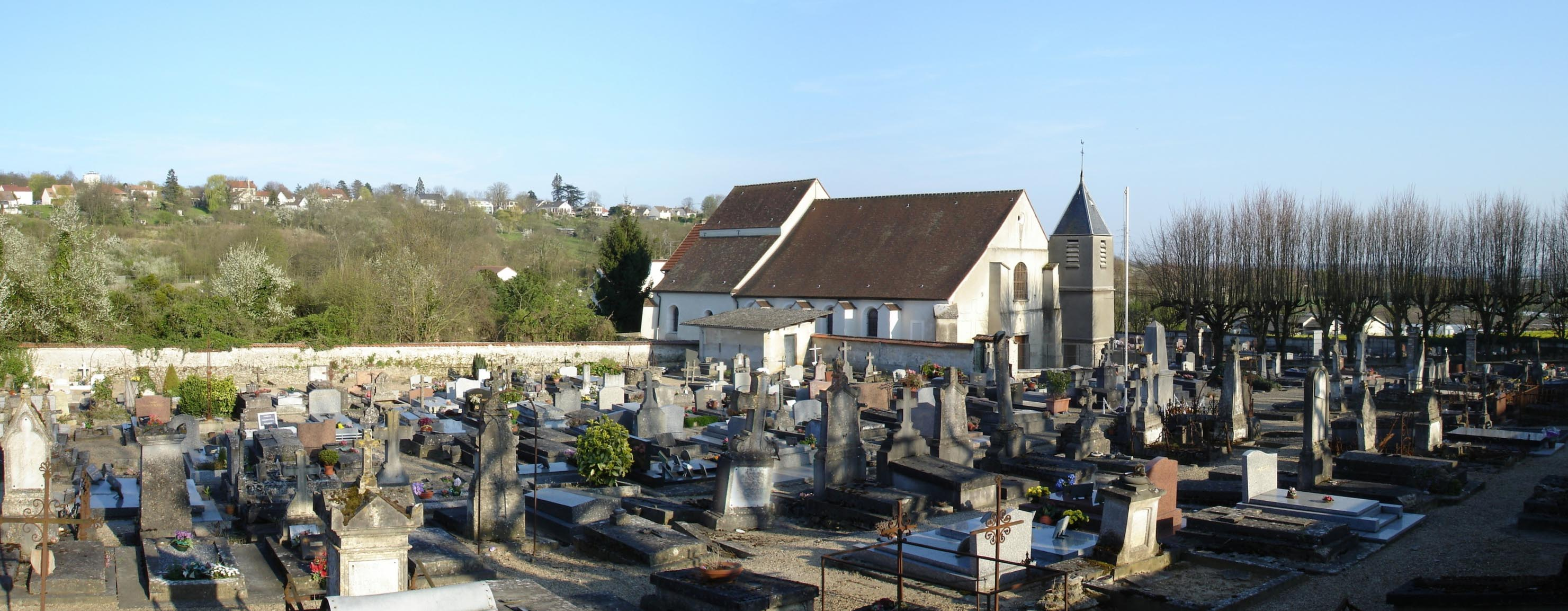 Eglise de Villevaudé (Seine-et-Marne), France